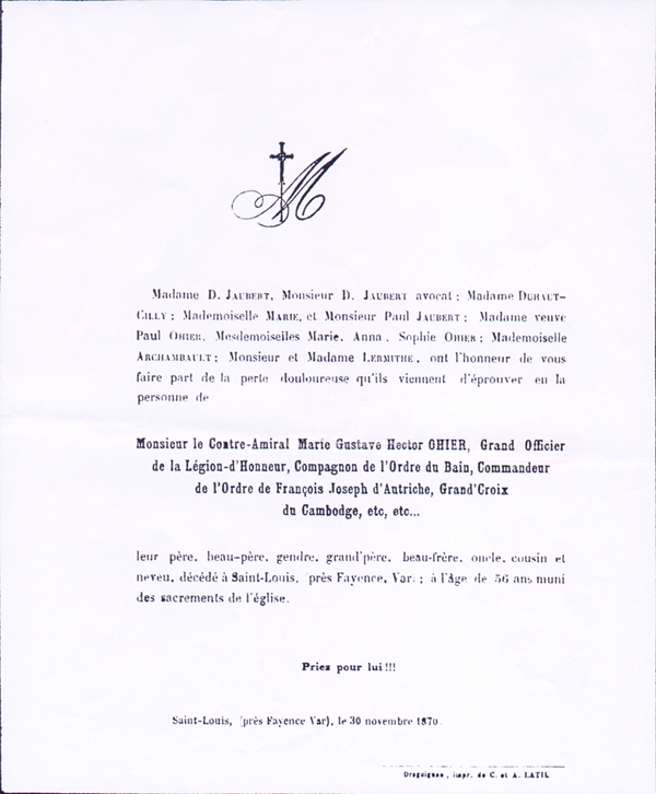 Faire-part de décès du Contre-Amiral Ohier